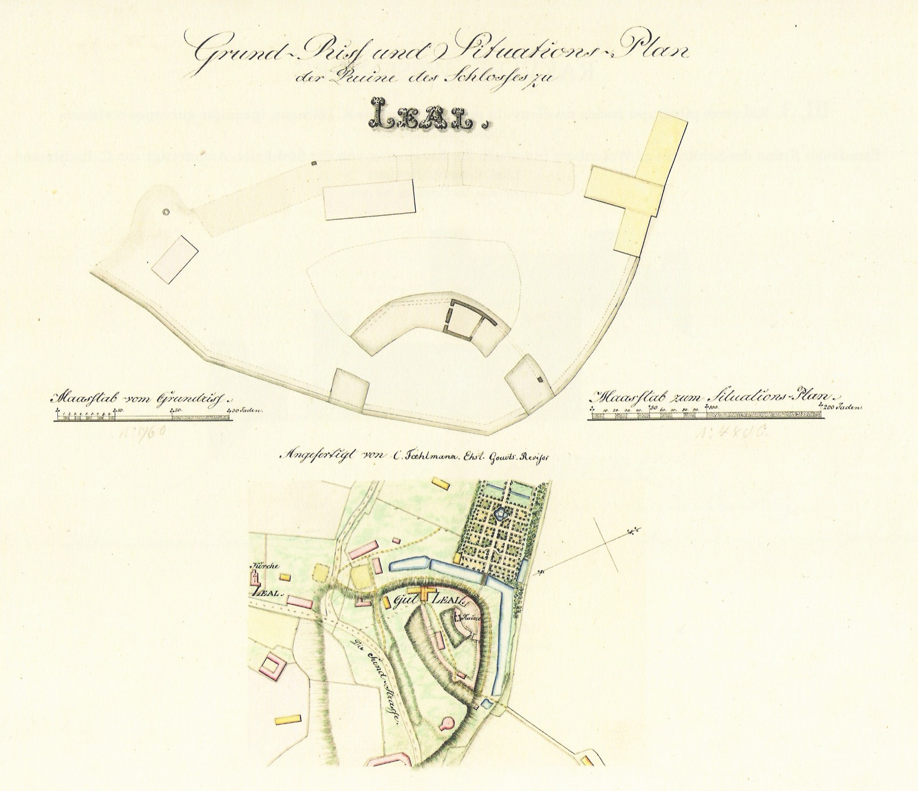 Lihula linnuse asendiplaan. Paulucci album